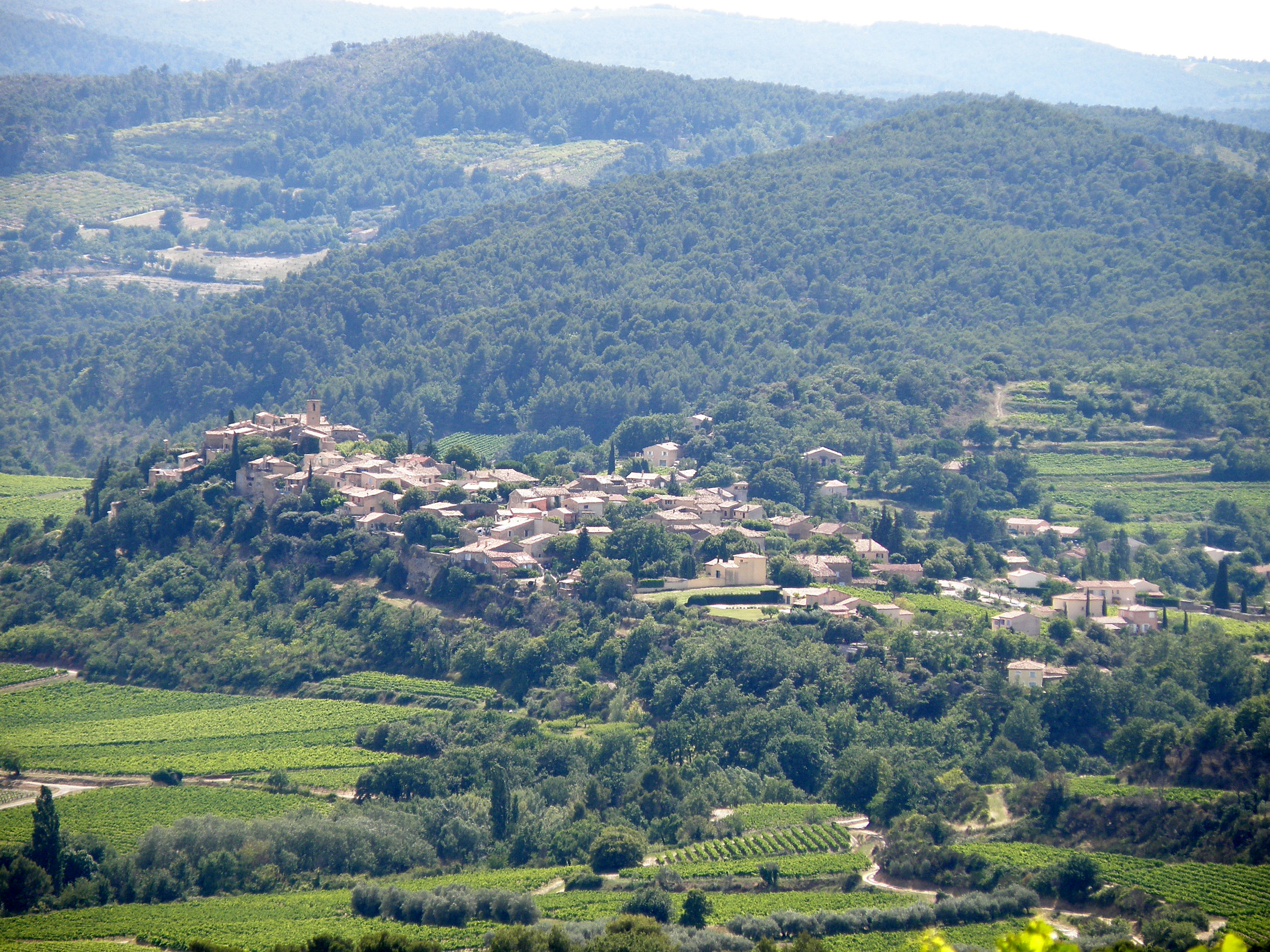 Faucon (Vaucluse, France). Vue générale prise à partir du vieux village de Mérindol-les-Oliviers.